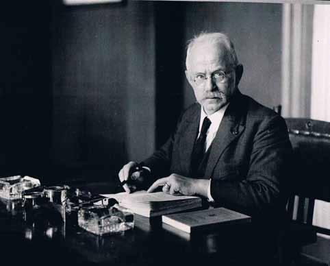 Jan Vesters (hoofdredacteur van De Volkskrant 1921-1941), zo karakteristiek achter zijn opvallend ordelijke bureau, thuis in Tuindorp, ergens tussen 1935 en 1940.